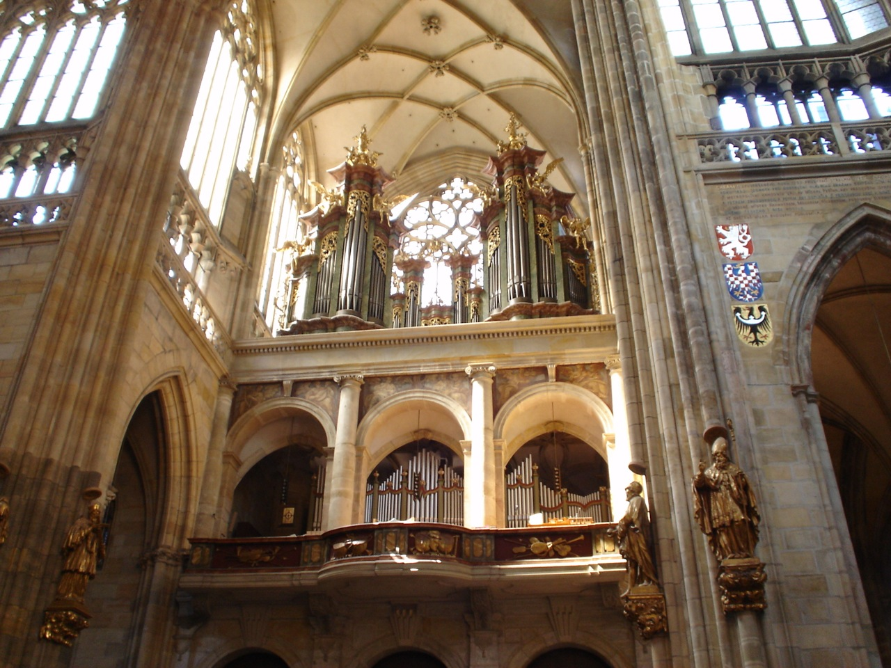 Praha, Katedrála svatého Víta, Václava a Vojtěcha, Hudební kruchta